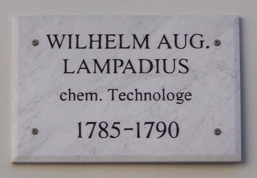 Göttinger Gedenktafel für Wilhelm August Lampadius (Weender Straße 30)